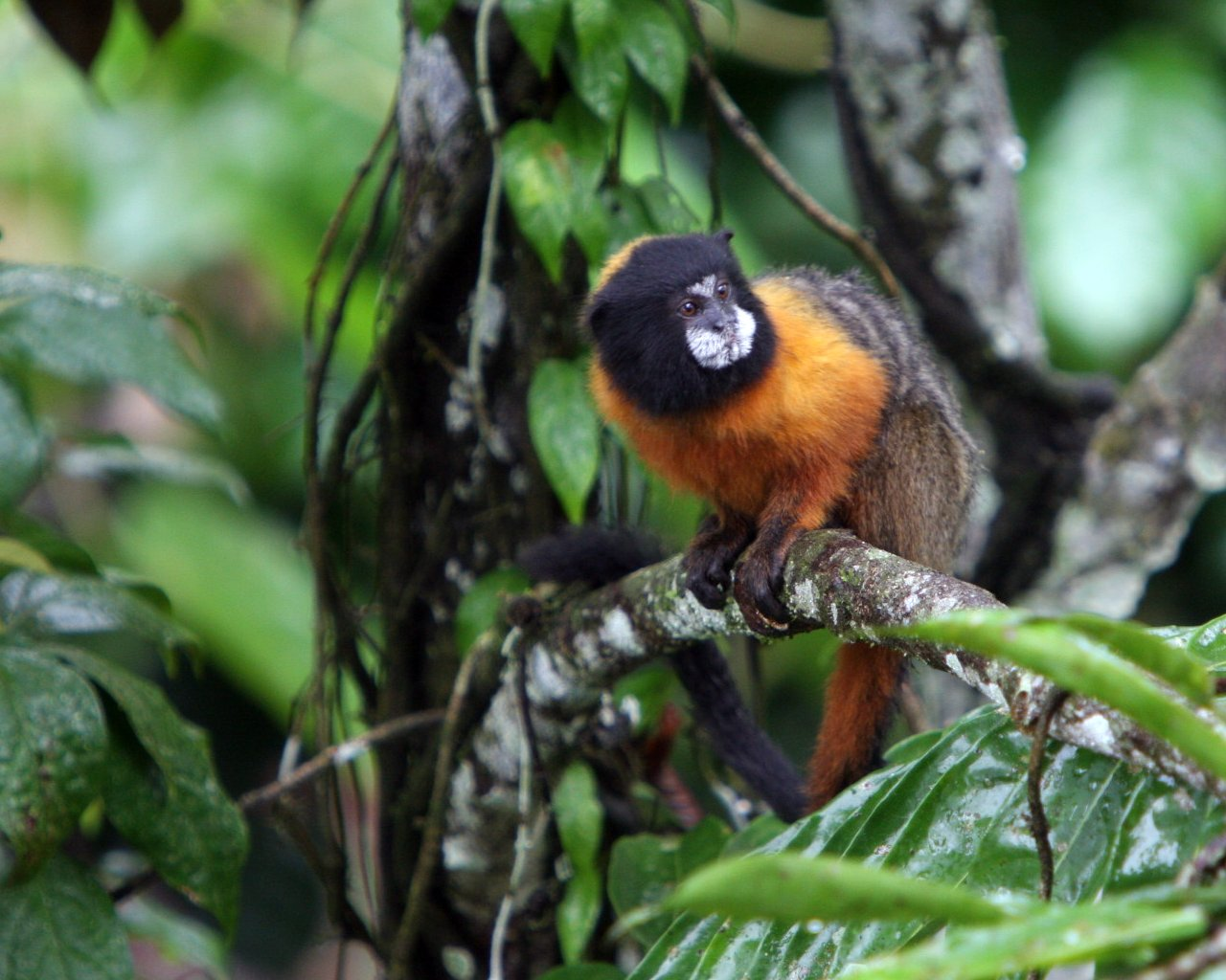 Golden-mantled Tamarin; Goldmanteltamarin; Goudmanteltamarin (Saguinus tripartitus)